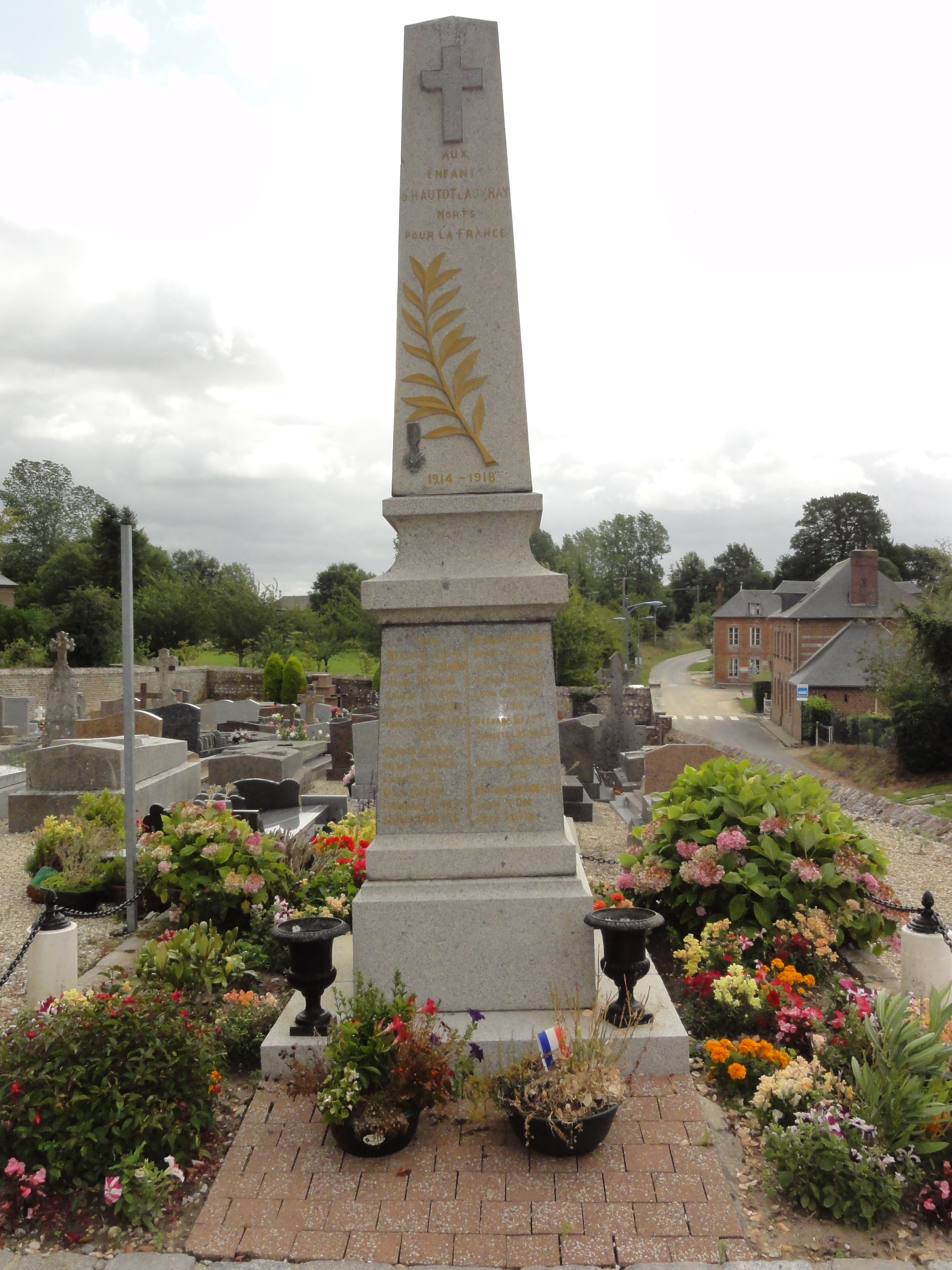 Hautot-l'Auvray (Seine-Mar.) monument aux morts